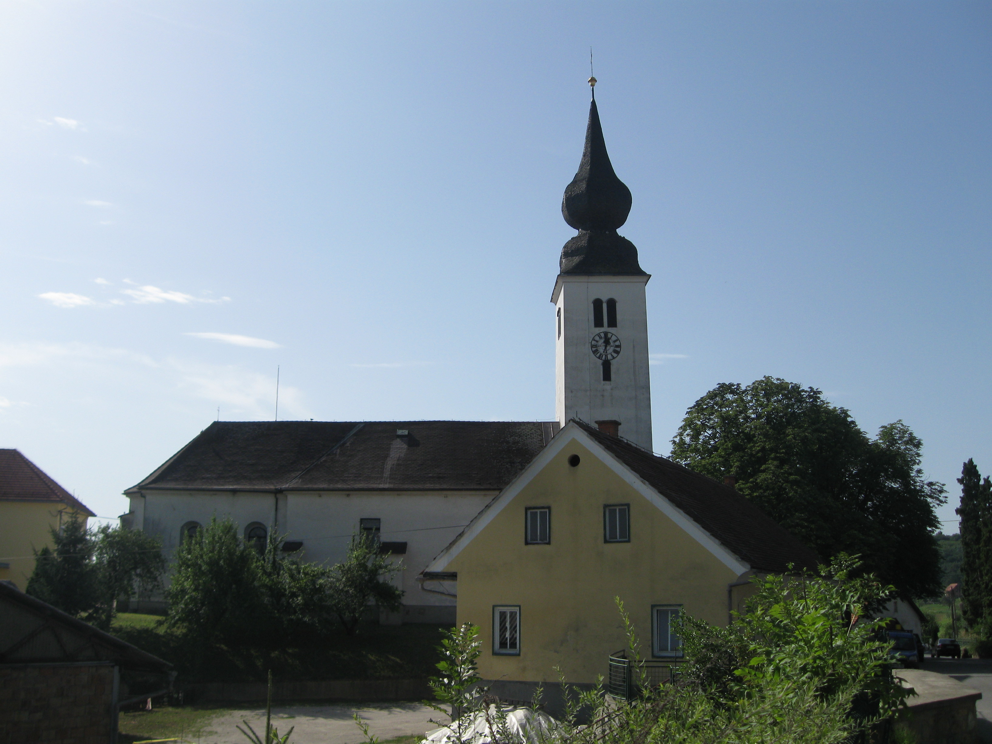 Cerkev je prvič omenjena v 14. stol., po porušitvi 1532 je bila 1567 znova pozidana. Sestavljajo jo zvonik, ladja, prezbiterij in baročna zakristija. Notranjščina je baročno obokana, oprema je baročna. V južni steni sta vzidana rimskodobna kamna.